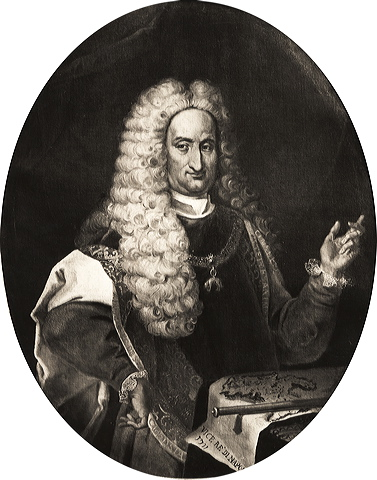 Carlo IV Borromeo Arese (28 aprile 1657-6 luglio 1734), conte di Angera, che fu vicerè di Napoli. Ritratto datato 1733. Carlo fu il primo dei Borromeo ad associare al proprio il cognome (materno) degli Arese. Una biografia è online qui.